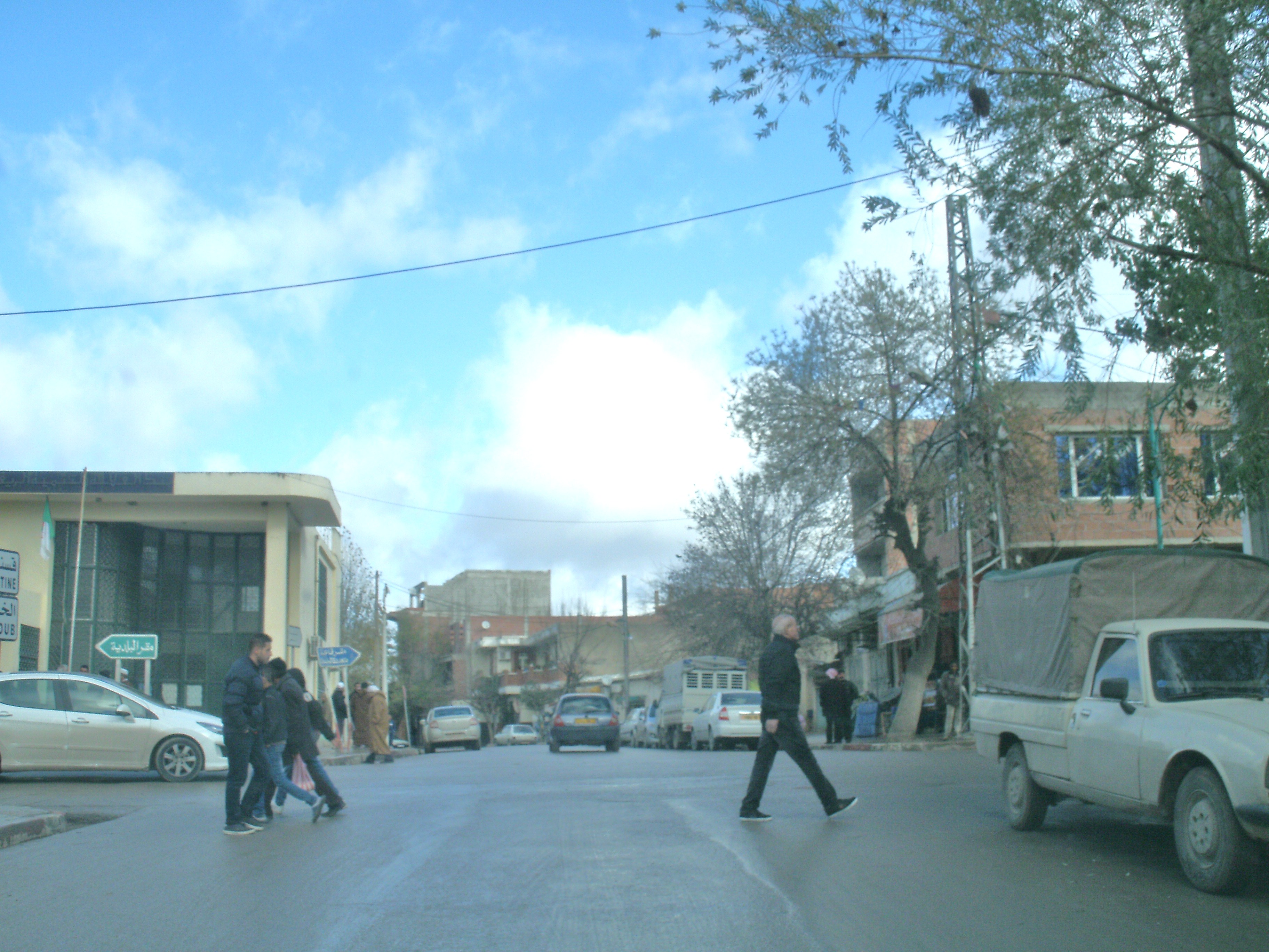 Ambiance de rue à Aïn Abid